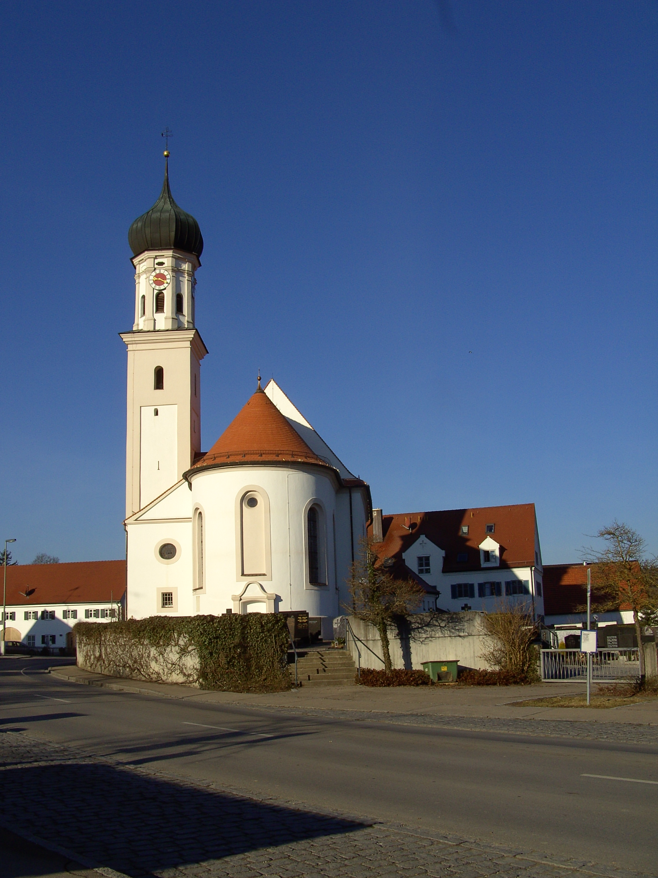 Kirche St. Laurentius in Agawang (Gem. Kutzenhausen)